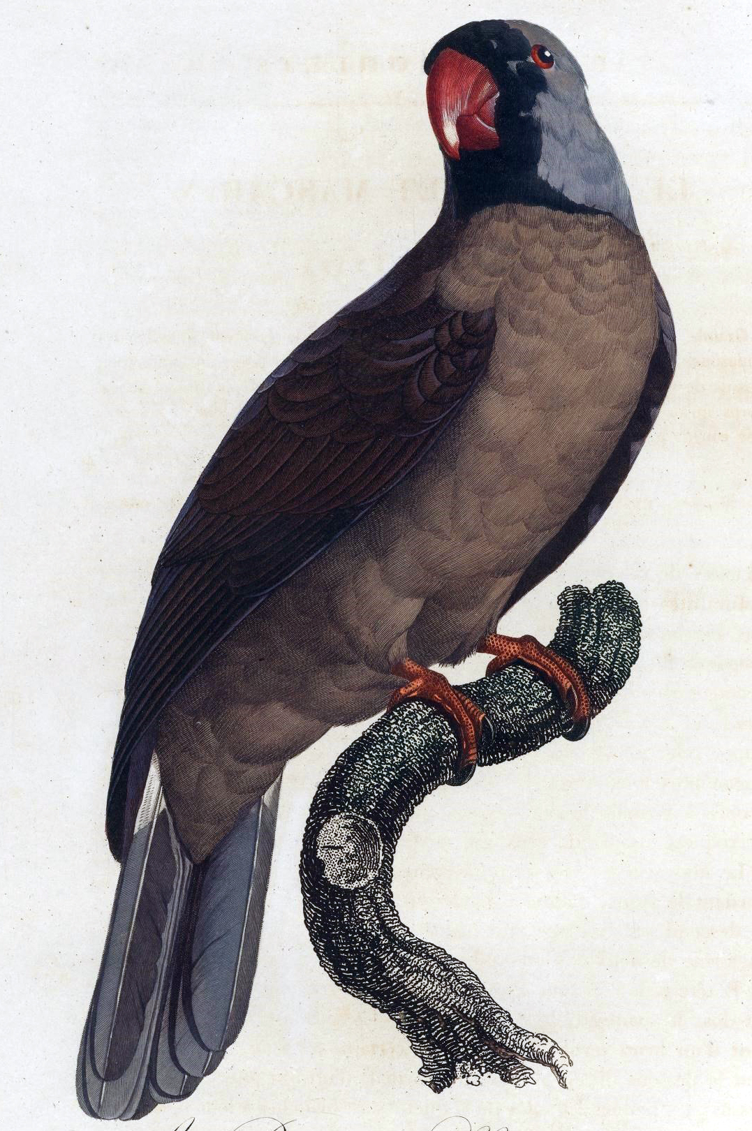 Le Perroquet Mascarin Plate 139 from François Levaillant's Histoire naturelle des Perroquets. Paris, 1801-1805.